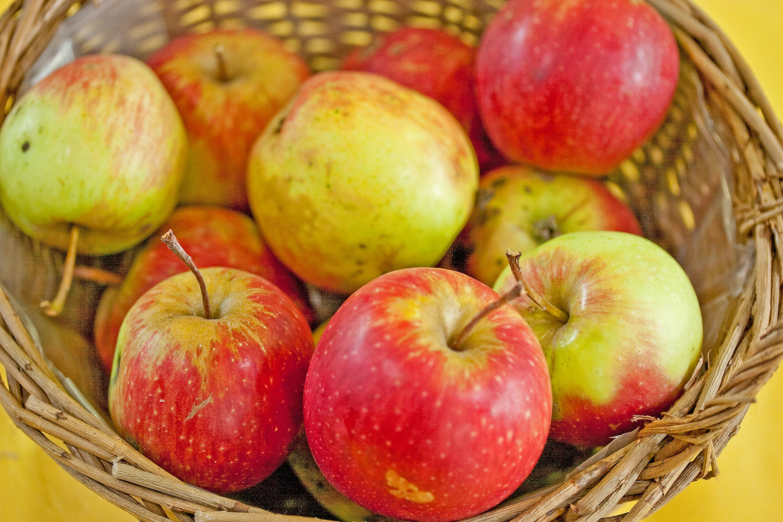 Der Arlet ist eine Apfelsorte